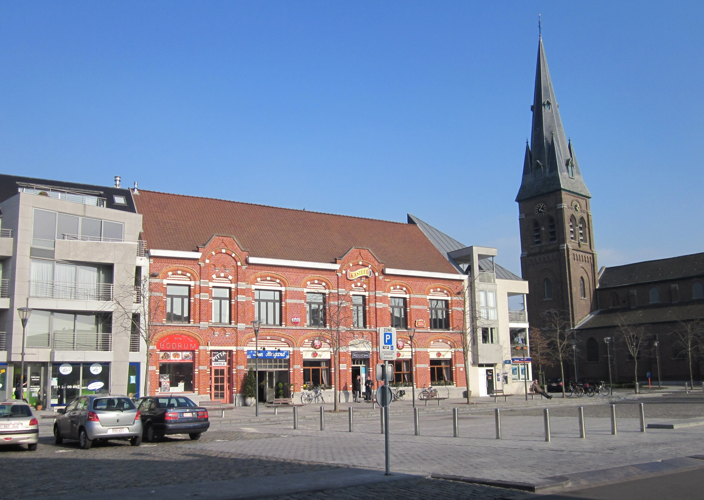 Marktplein Kuurne